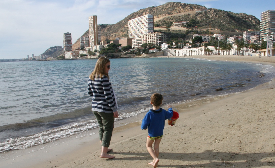 niñera cuidando niño en la playa